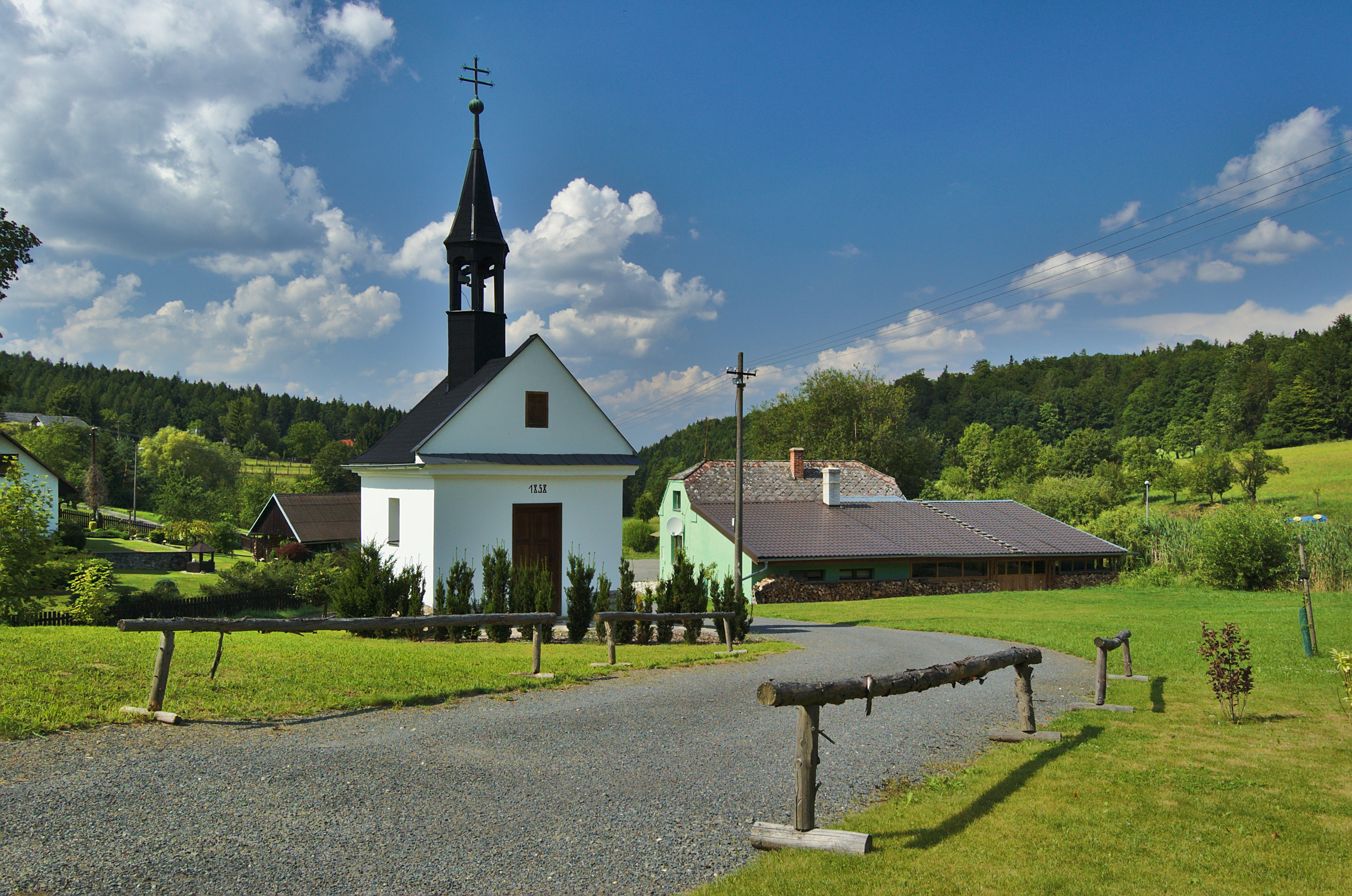 Kaple, Kadeřín, Bouzov, okres Olomouc